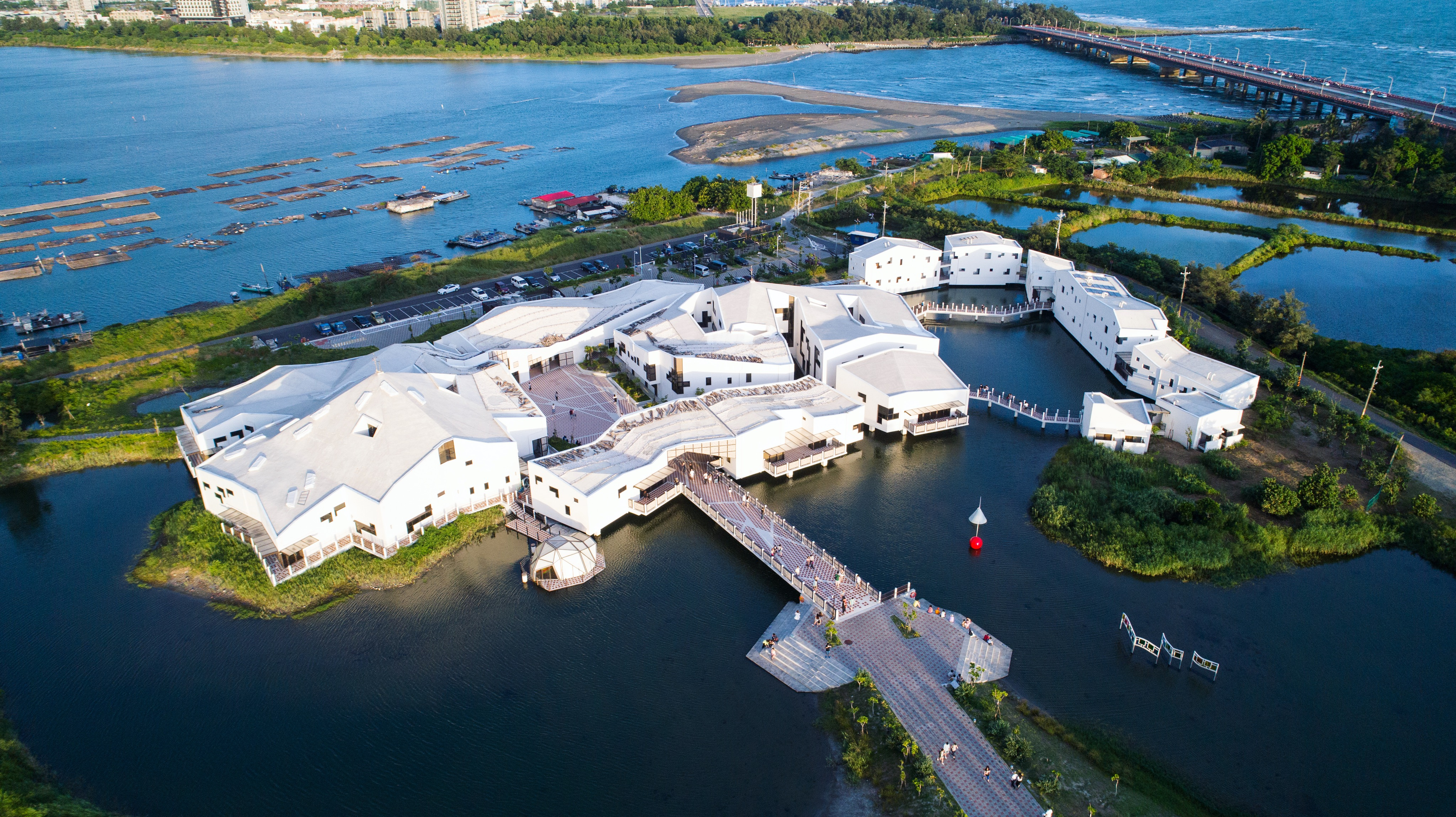 台江國家公園遊客中心空拍